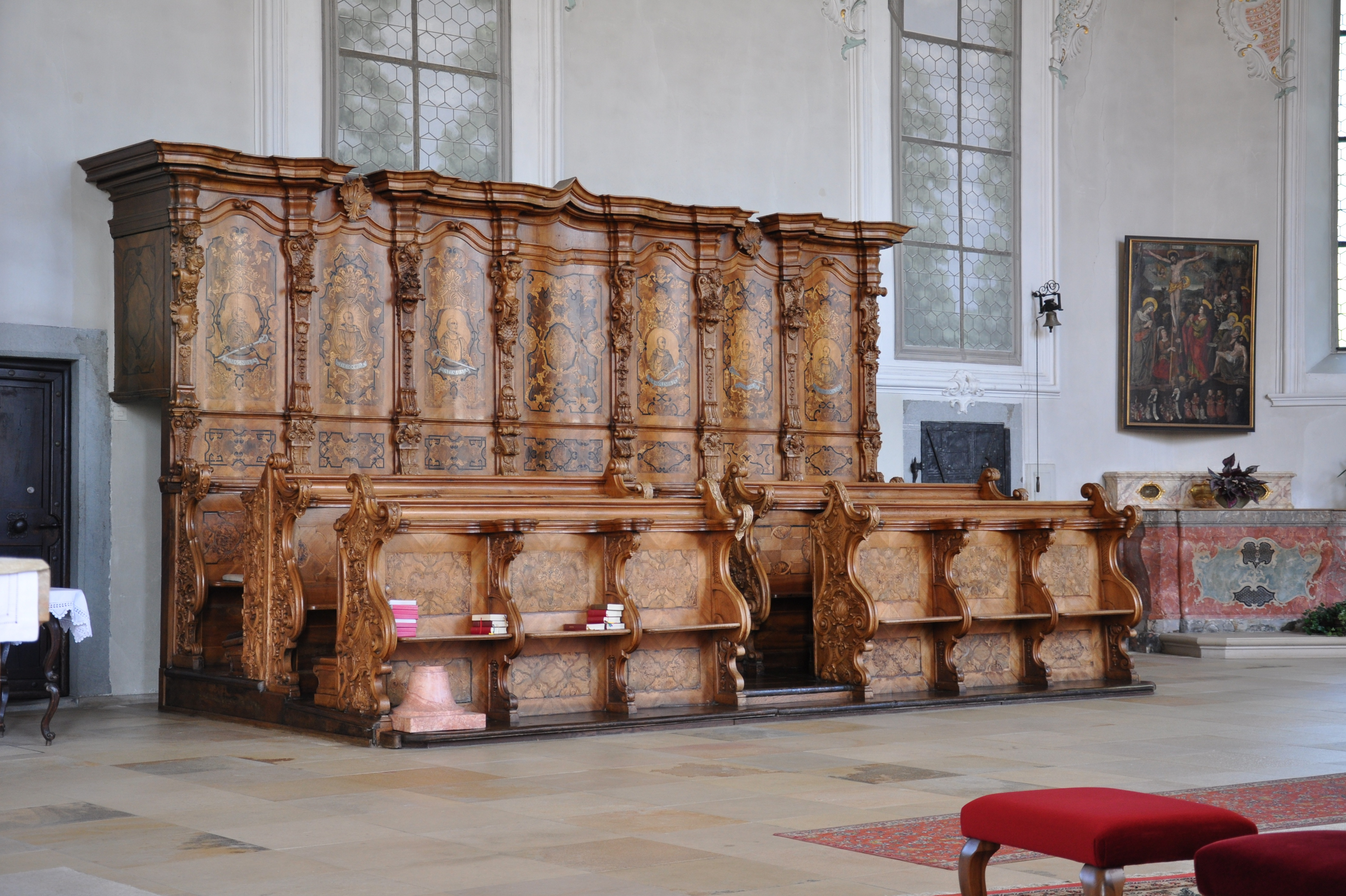 Bregenz, Pfarrkirche St. Gallus, Barockes Chorgestühl, um 1740 von Johann Joseph Christian für die Abteikirche Mehrerau gefertigt (seit 1808 in St. Gallus)